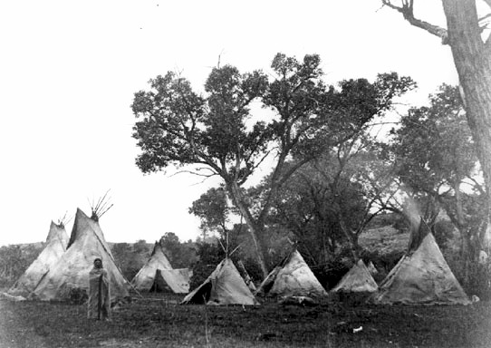 Arapaho Camp